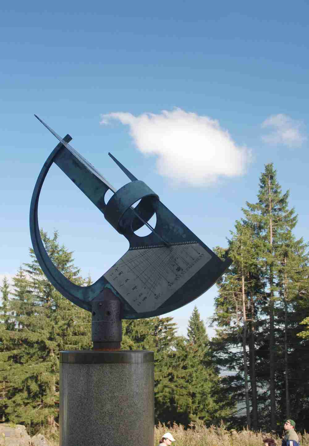 Sluneční hodiny na Kleti